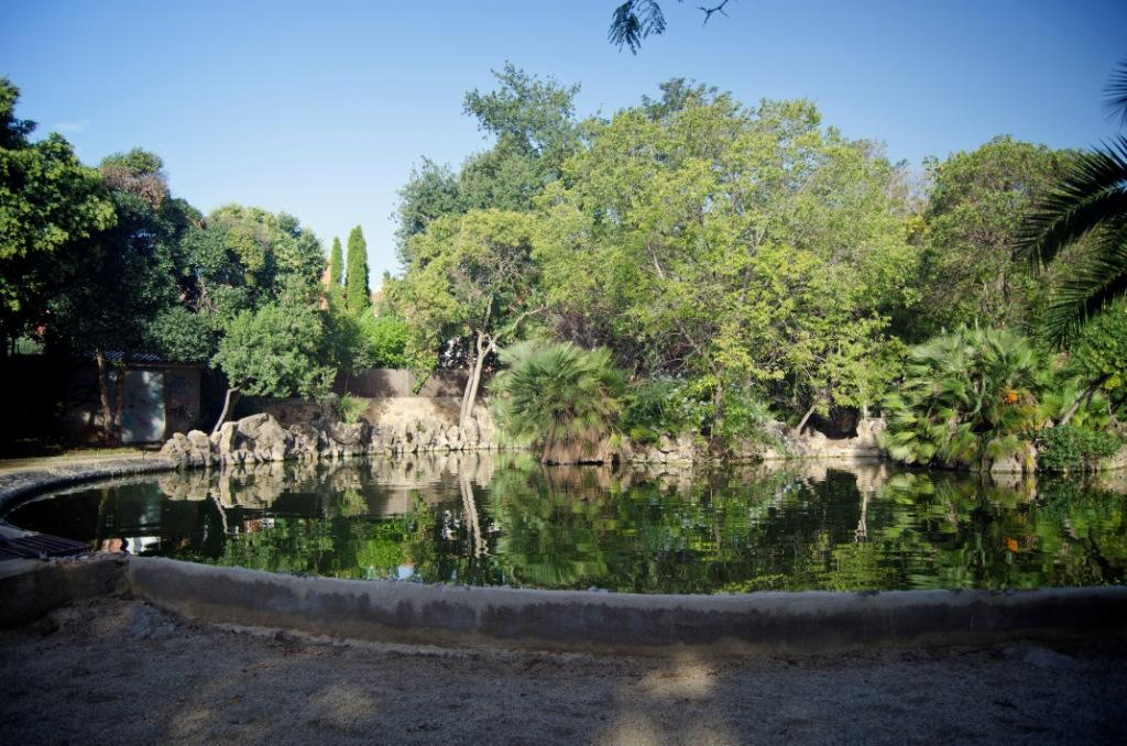 Parc del Llac, al Masnou (Maresme, Catalunya).